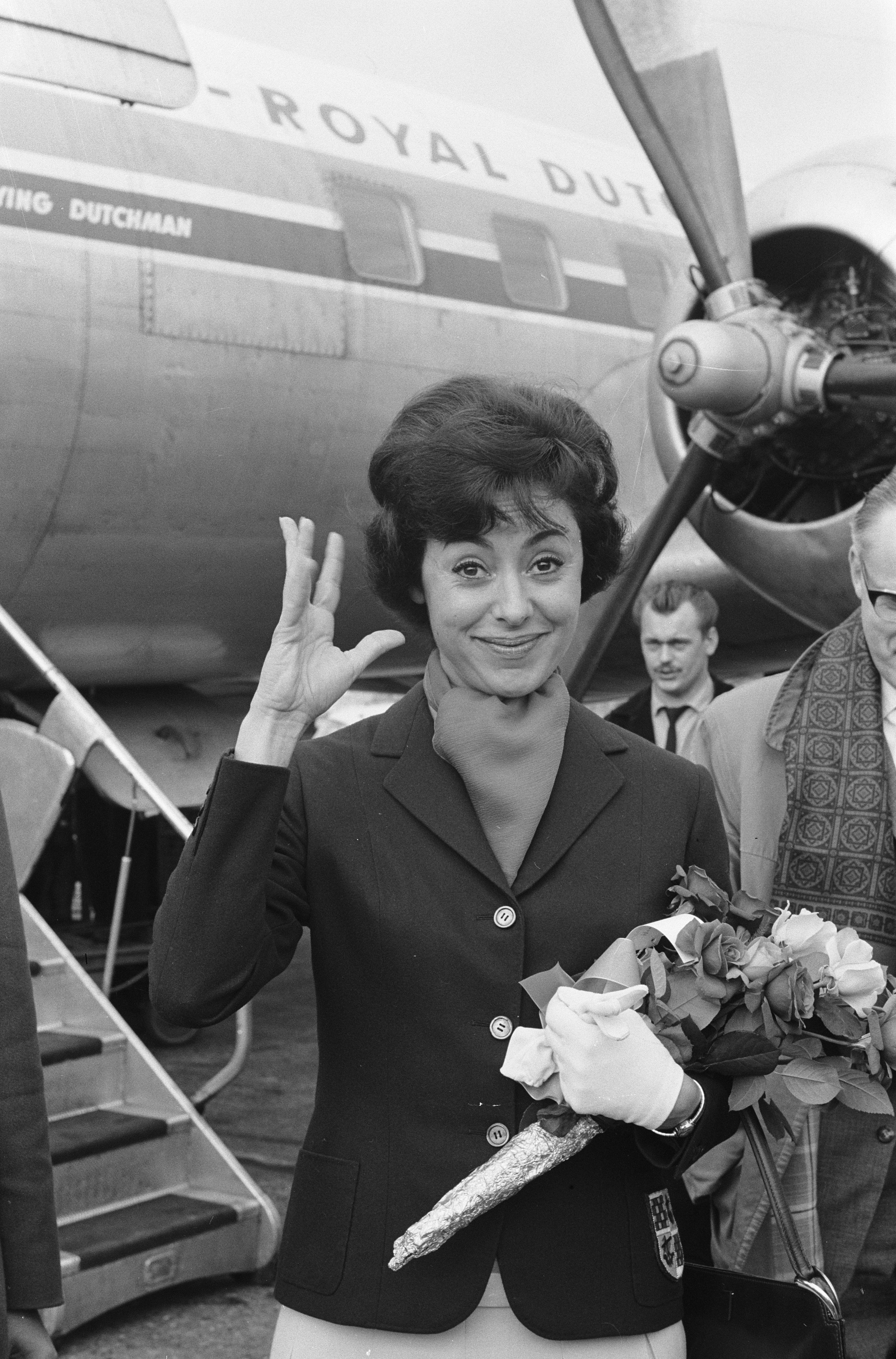 Collectie / Archief : Fotocollectie Anefo Reportage / Serie : Aankomst op Schiphol van de zangeressen voor het Grand Gala Beschrijving : Caterina Valente Datum : 29 september 1961 Locatie : Noord-Holland, Schiphol Trefwoorden : zangeressen Persoonsnaam : Valente, Caterina Fotograaf : Fotograaf Onbekend / Anefo Auteursrechthebbende : Nationaal Archief Materiaalsoort : Negatief (zwart/wit) Nummer archiefinventaris : bekijk toegang 2.24.01.05 Bestanddeelnummer : 912-9903